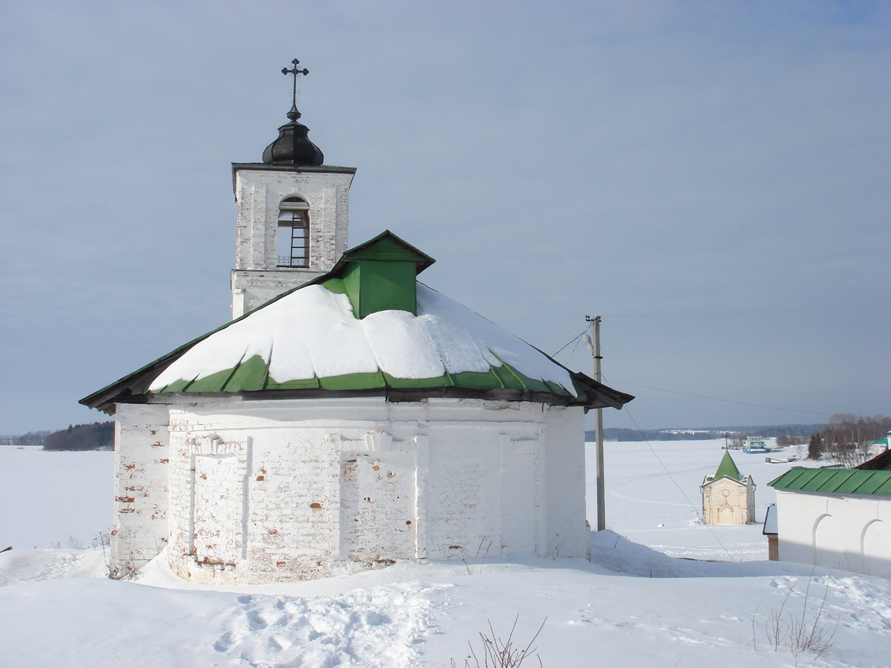 Церковь Введения во Храм Пресвятой Богородицы (Вологодская область, Кириллов, село Горицы)